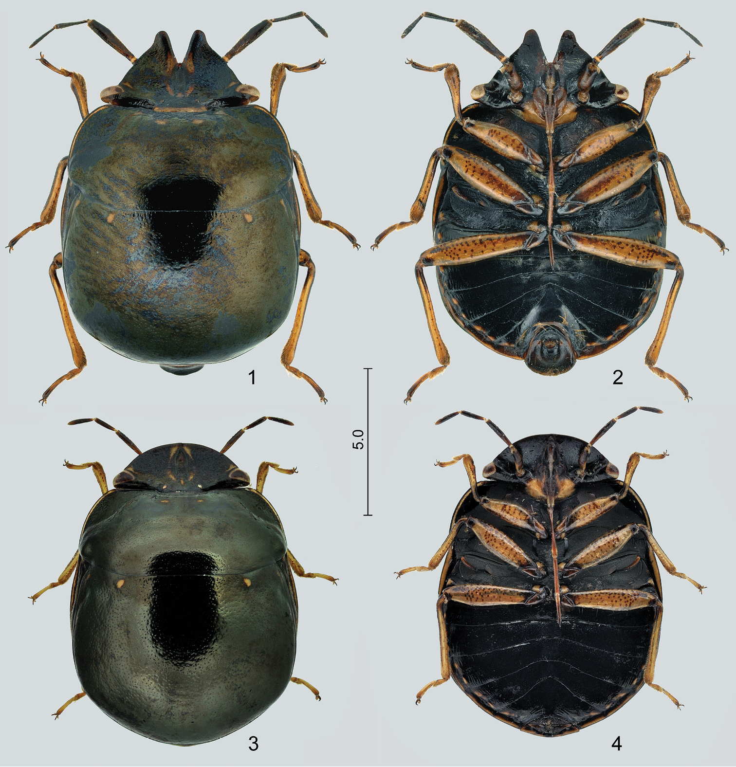 Figures 1–4; Claviplatys henryi gen. et sp. n. 1 holotype (male), dorsal view 2 same, ventral view 3 paratype (female), dorsal view 4 same, ventral view. Scale bar in mm.